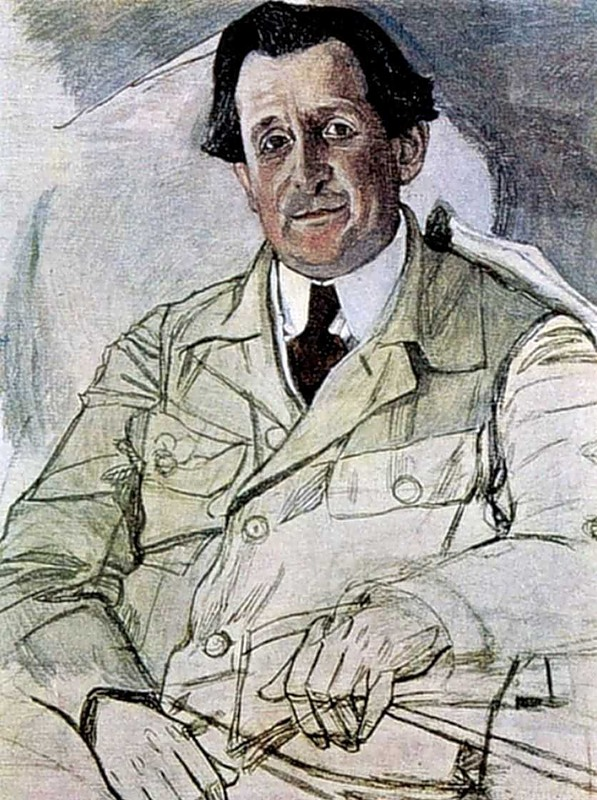 Головин Александр. Портрет Э.А.Купера. 1919